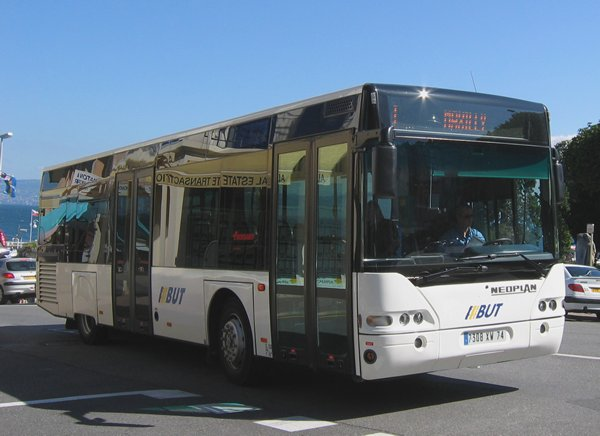 Autobus Neoplan Centroliner. - Licence GFDL. Auteur : Olivier MEYER Olivier Meyer